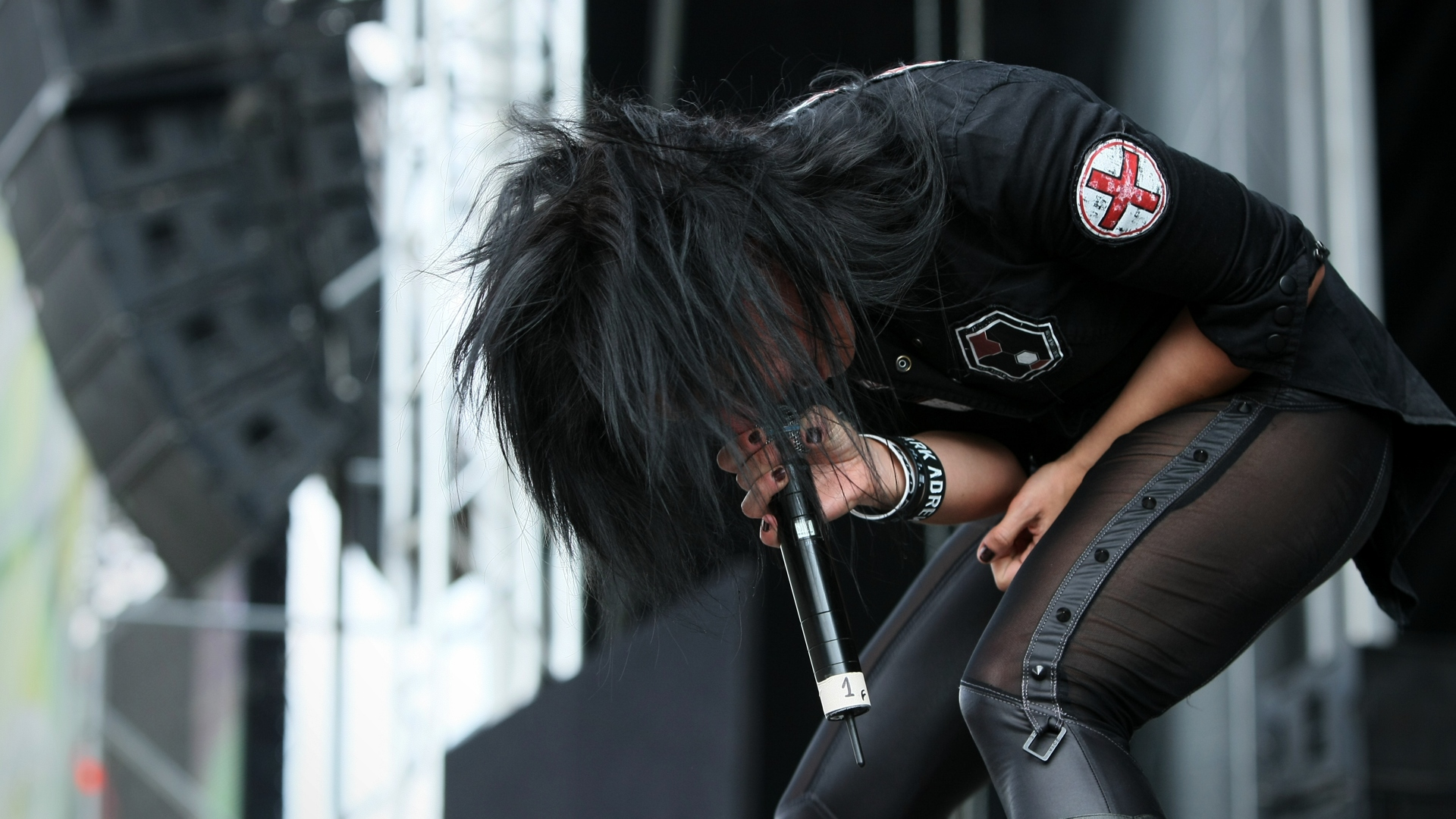 Cristina scabbia en el Hard rock microphone